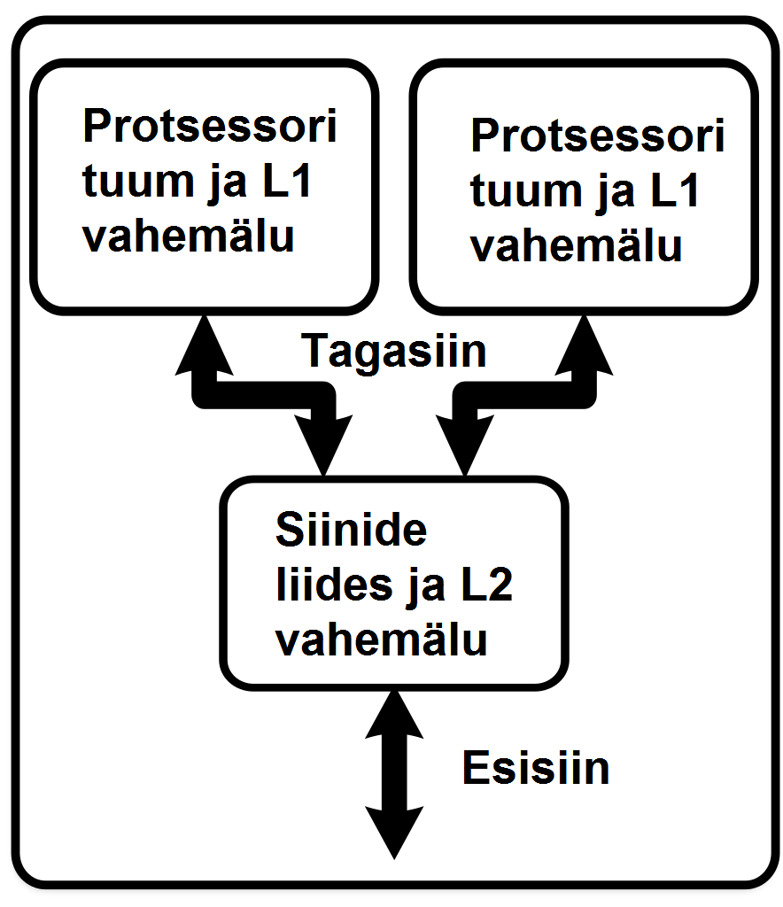 Cpu Bus